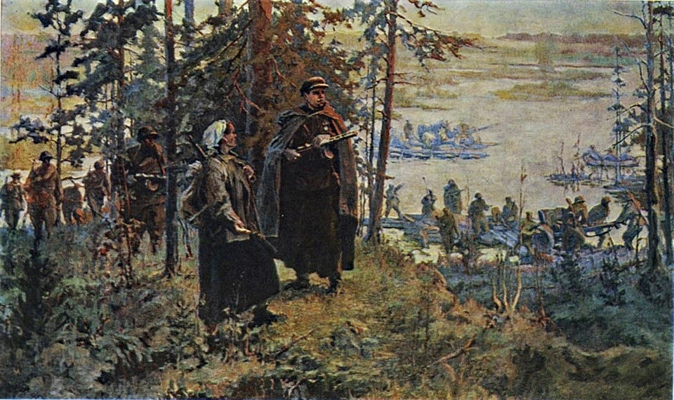 Пераправа. 1945